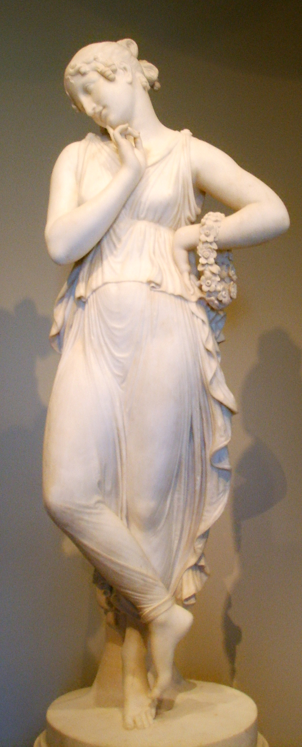 National gallery in washington d.c., antonio canova, ballerina con un dito sul mento 1809-1822